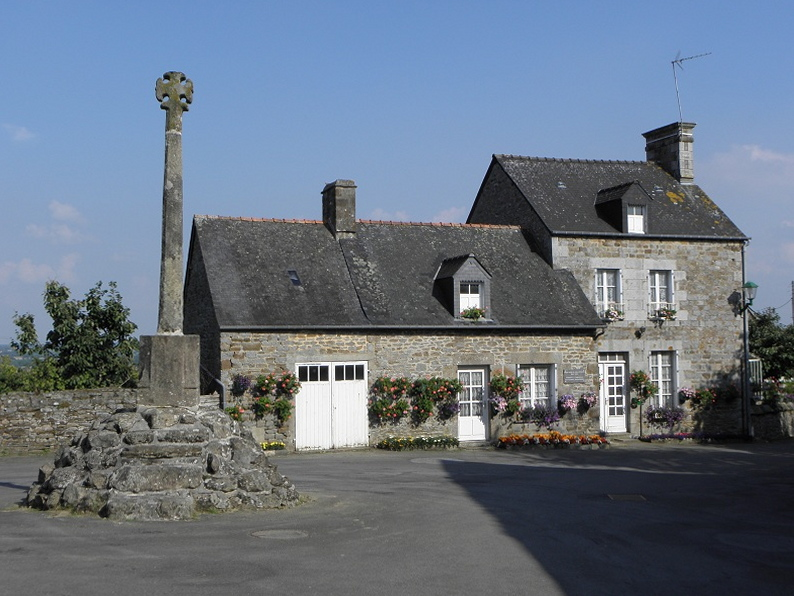 Maison natale de Jean Langlais à La Fontenelle (35).